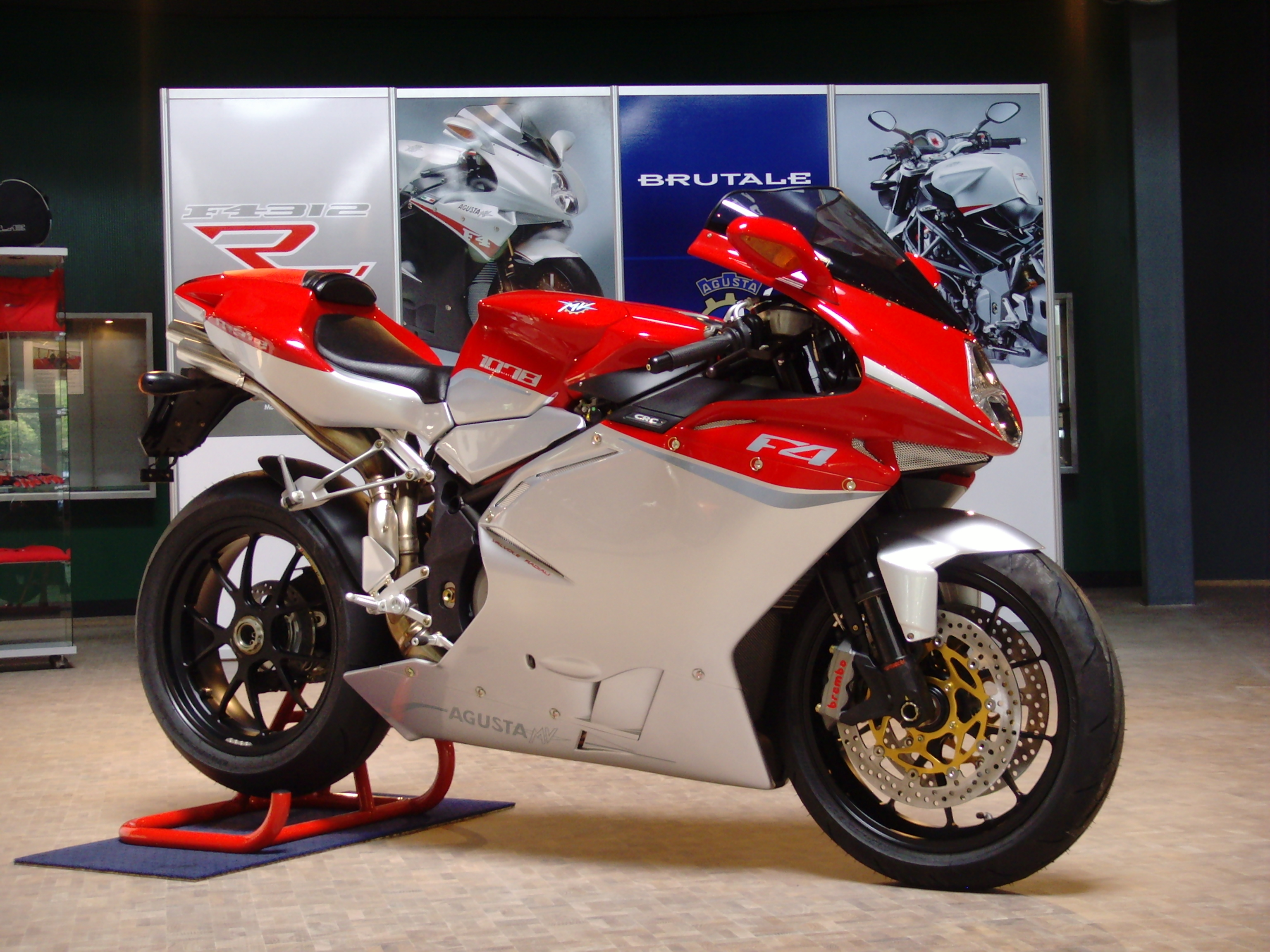 MV Agusta F4 RR312